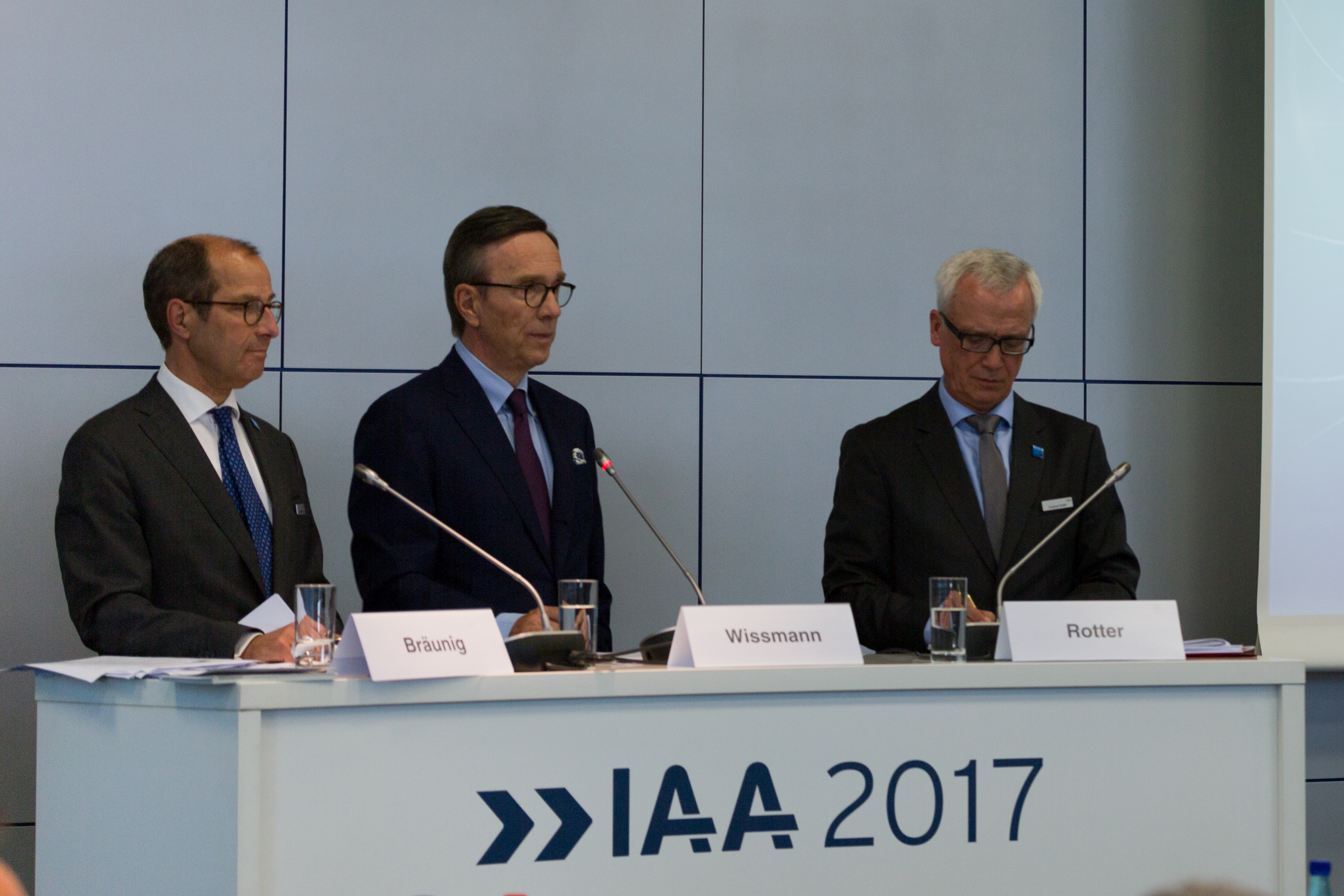 IAA 2017 Pressekonferenz